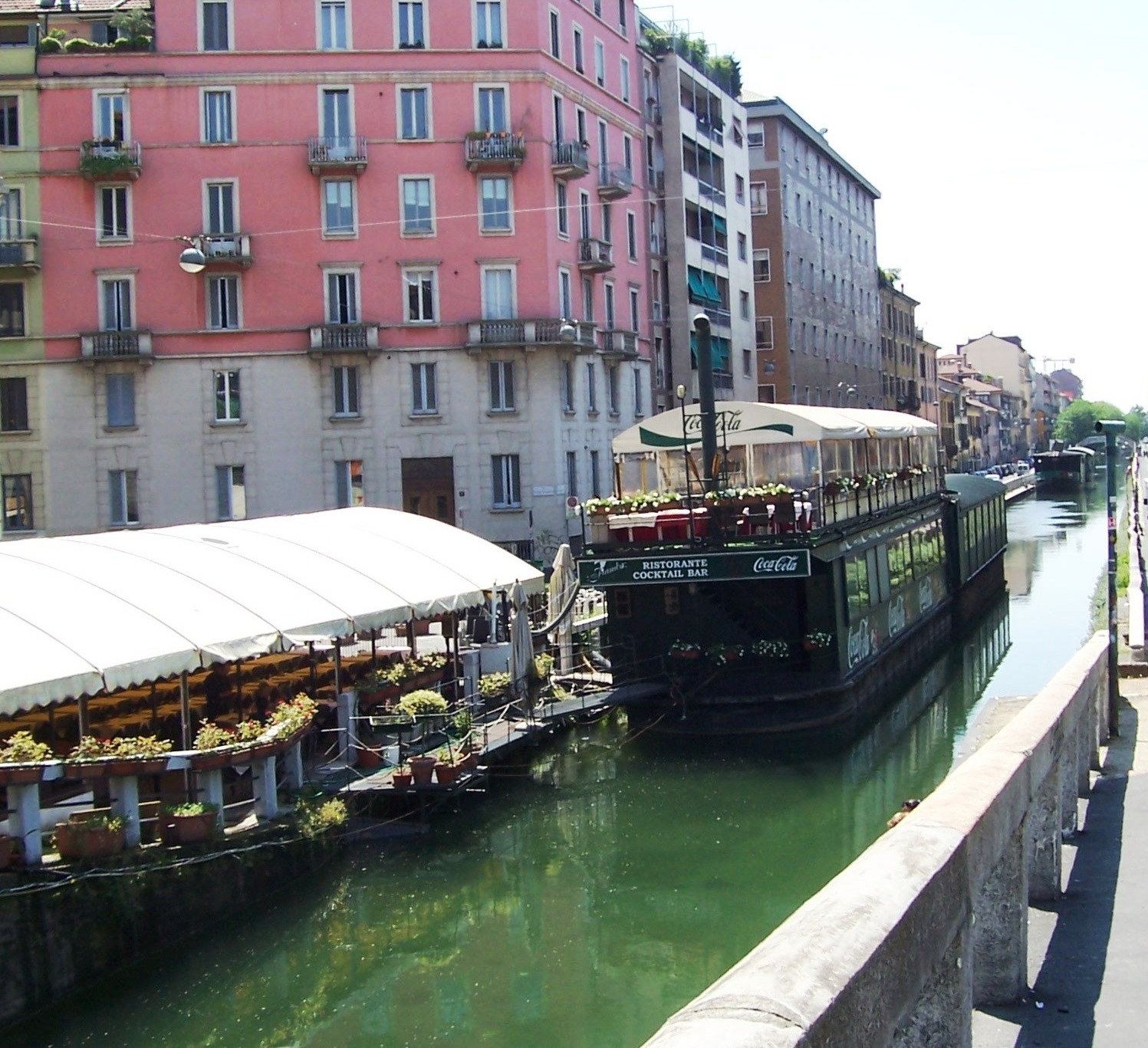 Il Naviglio Pavese Subito DOPO l' incike a Milano